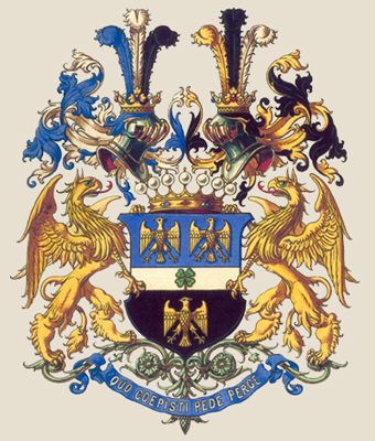 Wappen der Familie Beck, Freiherren von Mannagetta und Lerchenau (Freiherrenstand 1912)